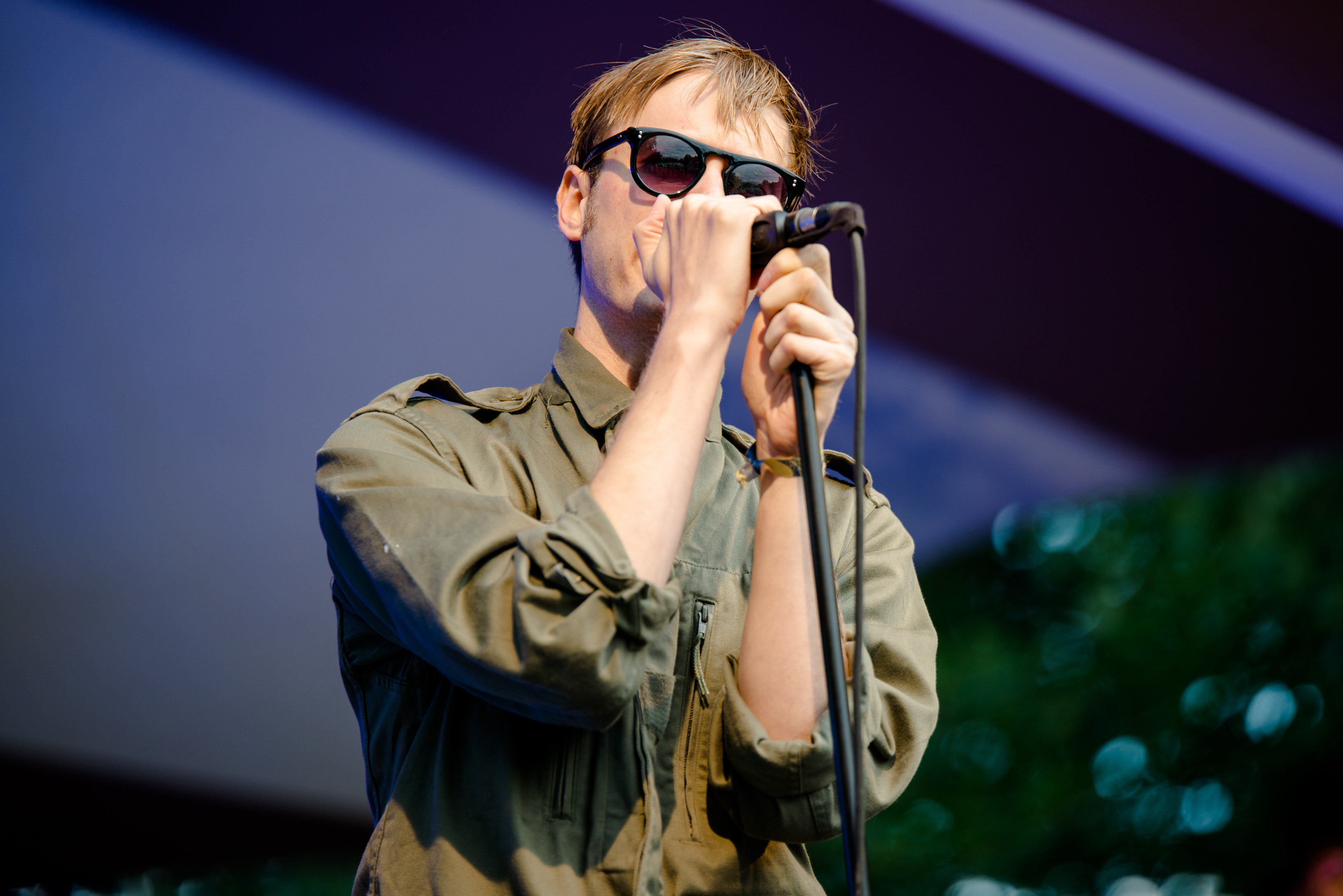 de